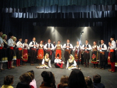 Kulturno-umjetničko društvo "Branko Radičević" iz Darde, nastup u Dardi 30. XI. 2003. godine